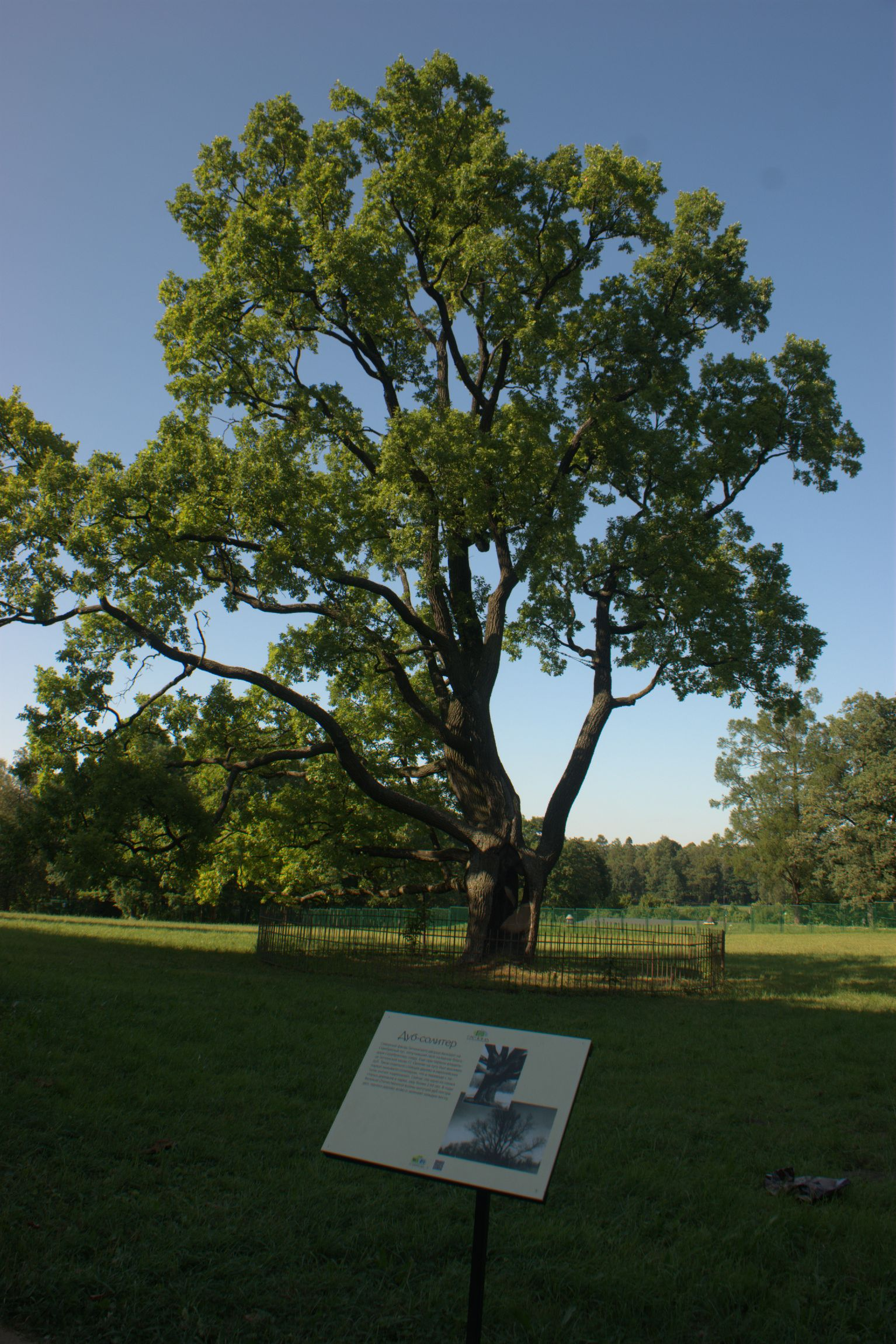 Дуб черешчатый: Гатчина, территория дворцово-паркового музея-заповедника "Гатчина", Серебряный луг,Гатчинский район, Ленинградская область This image is related to the protected area of Russia number 4790243